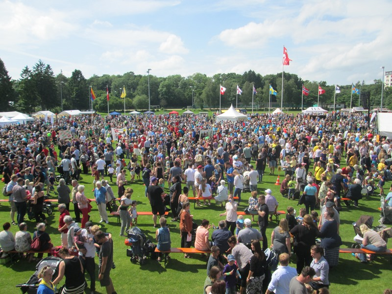 Dansk årsmøde i Flensborg 2017